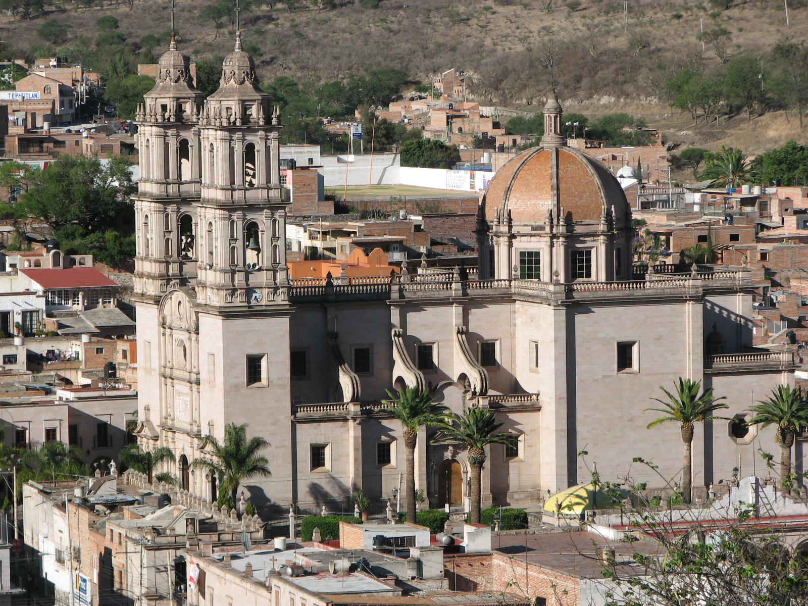 Vista de Yahualica